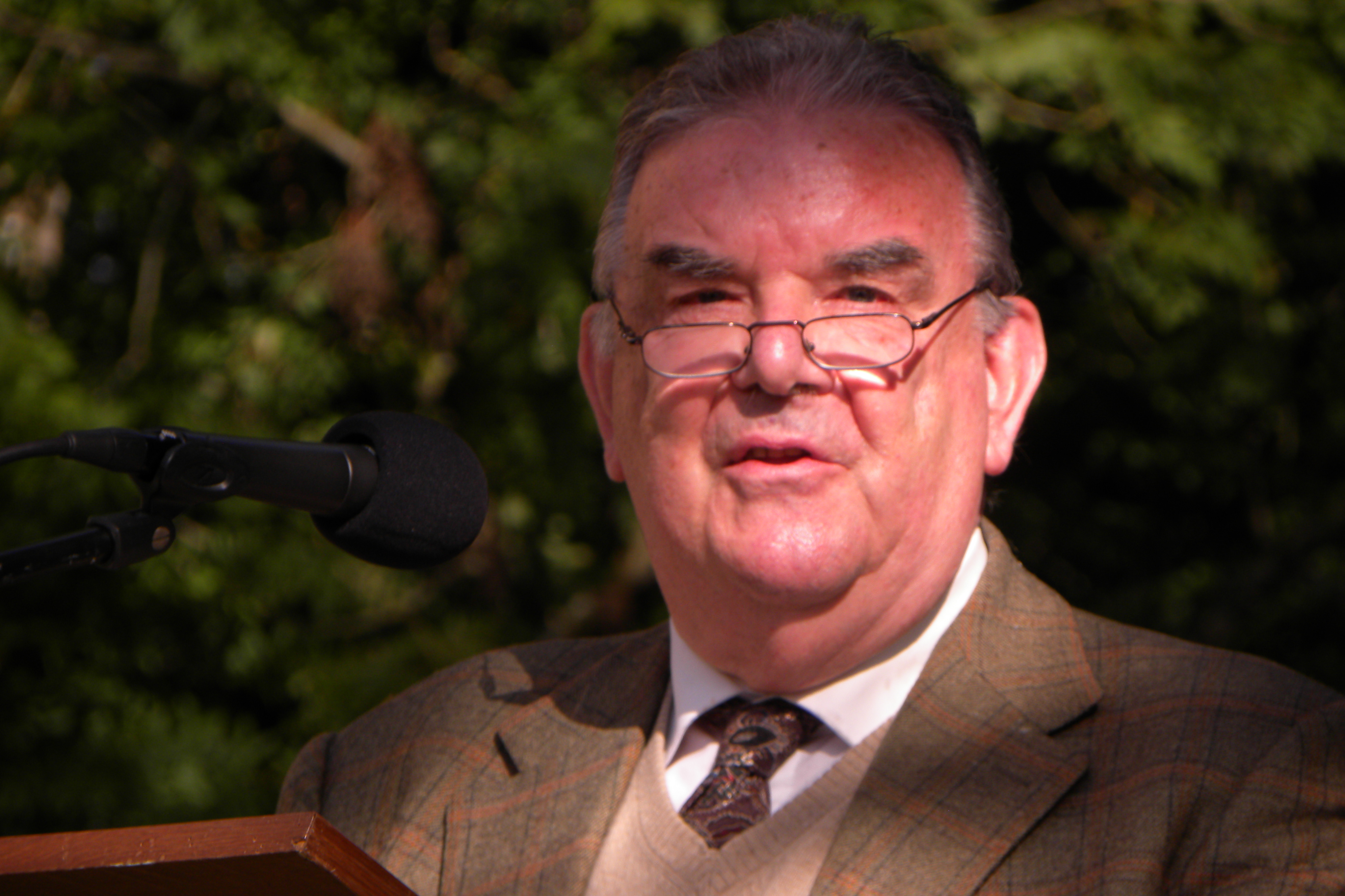 Patrick Nothomb, diplomate belge né le 24 mai 1936. (photo du 30 septembre 2012) au Pont d'Oye.